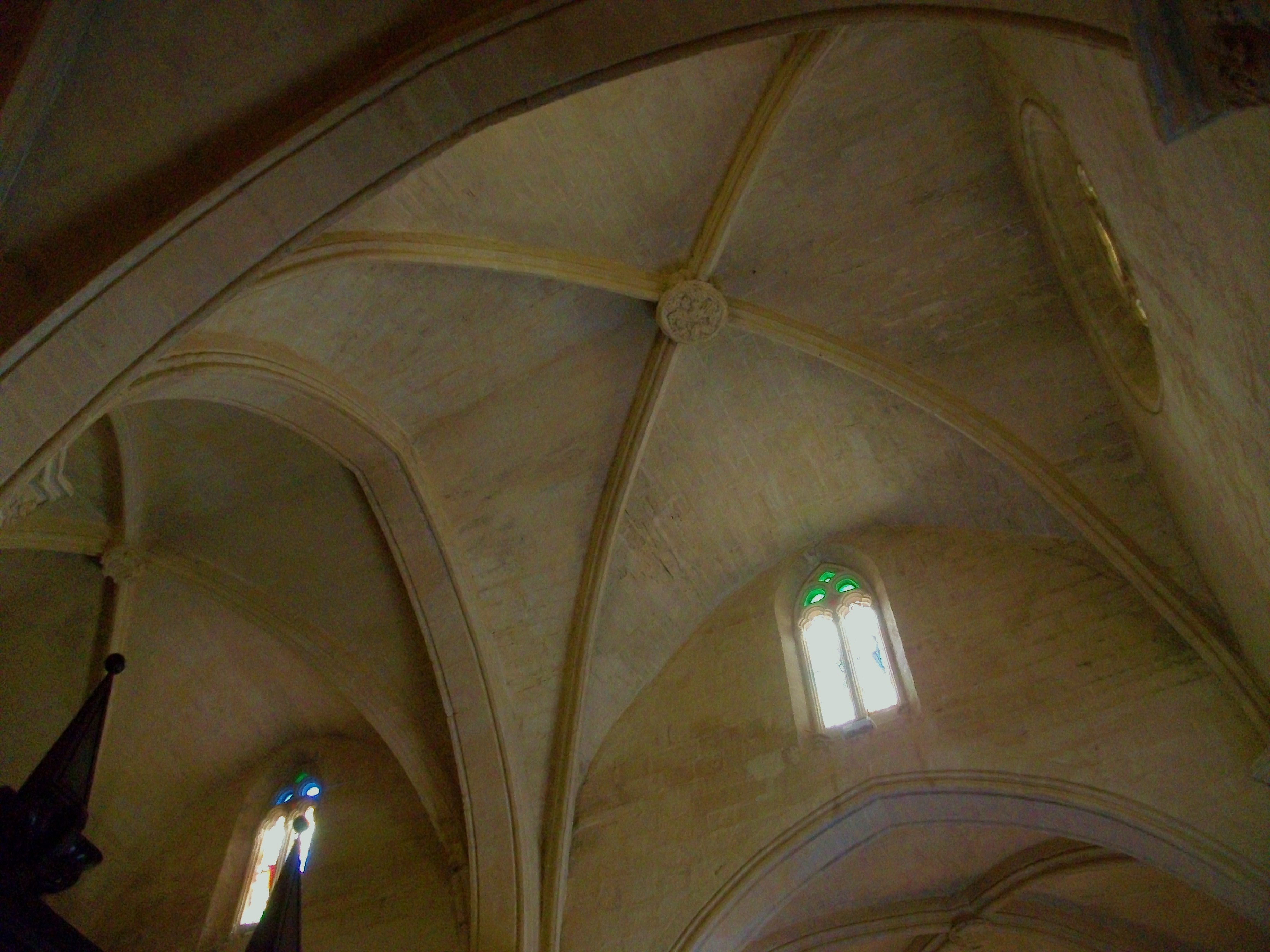 Voltes gòtiques de la catedral d'Oriola.